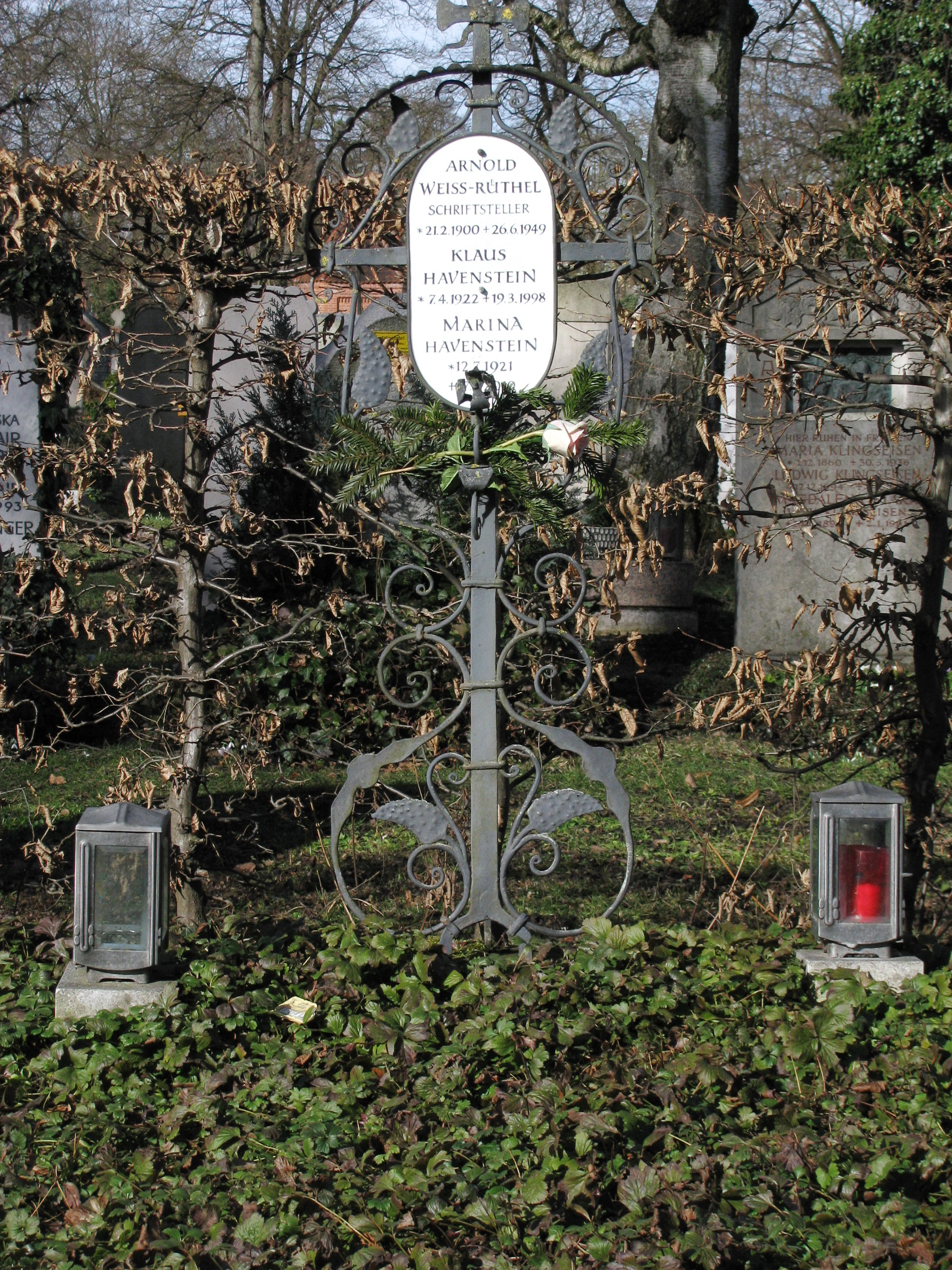 Grab von Klaus Havenstein im Münchner Nordfriedhof